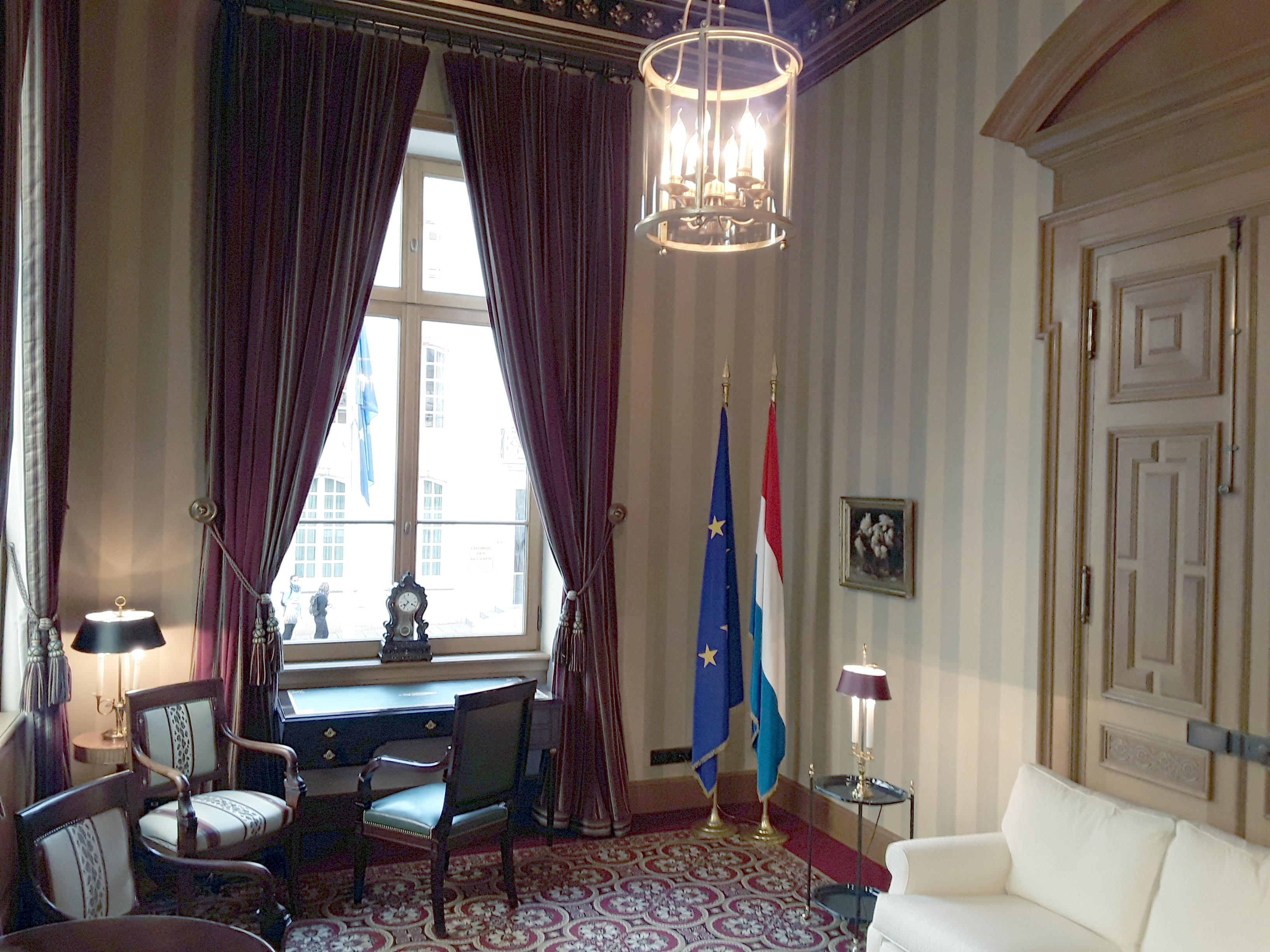 À l'intérieur de l'Hôtel de la Chambre des Députés à Luxembourg. Une pièce au rez-de-chaussée.